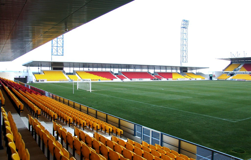 estadio cidade de barcelos